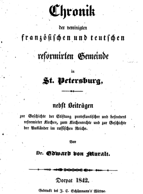 Titelblatt von: Edward von Muralt, Chronik der vereinigten französischen und teutschen reformirten Gemeinde in St. Petersburg nebst Beiträgen zur Geschichte der Stiftung protestantischer und besonders reformirter Kirchen, zum Kirchenrechte und zur Geschichte der Ausländer im russischen Reiche. Dorpat 1842.